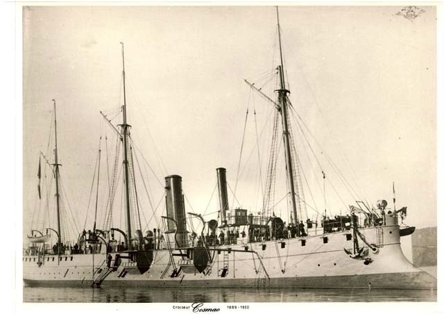 Photographie du croiseur Cosmao